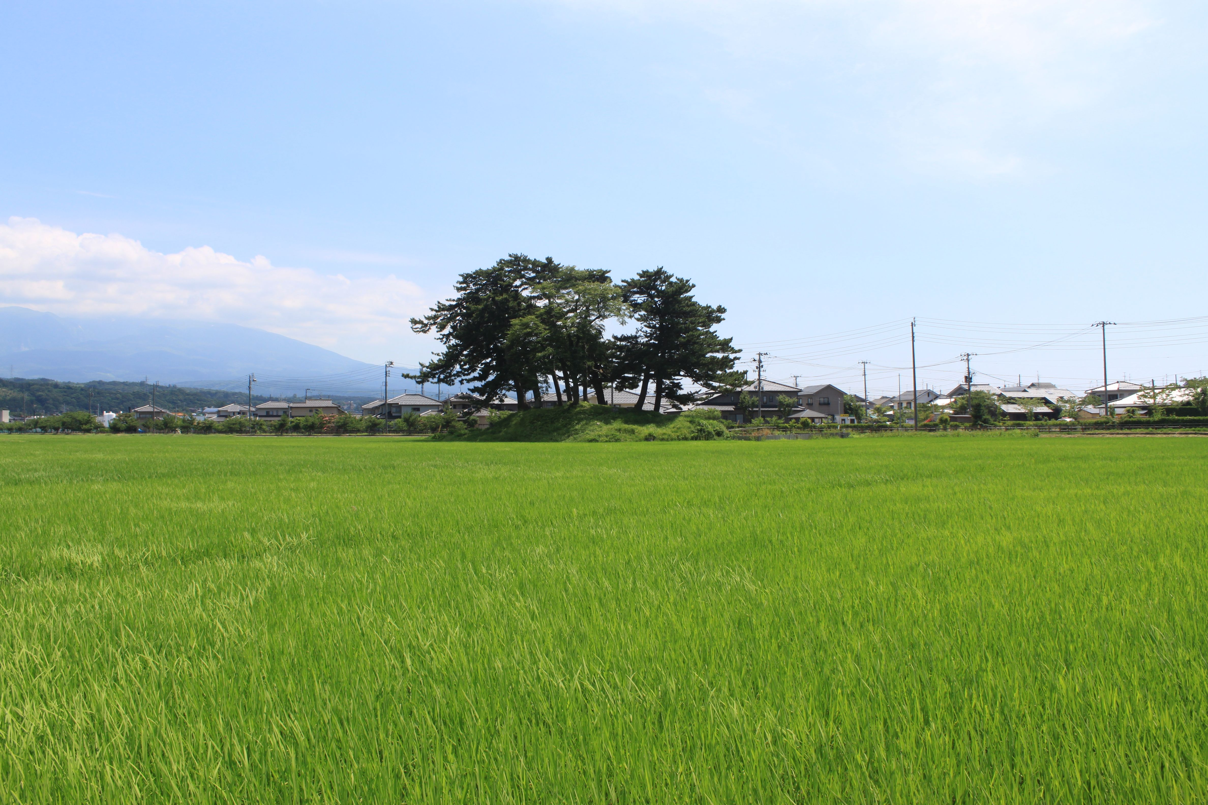 九十九島